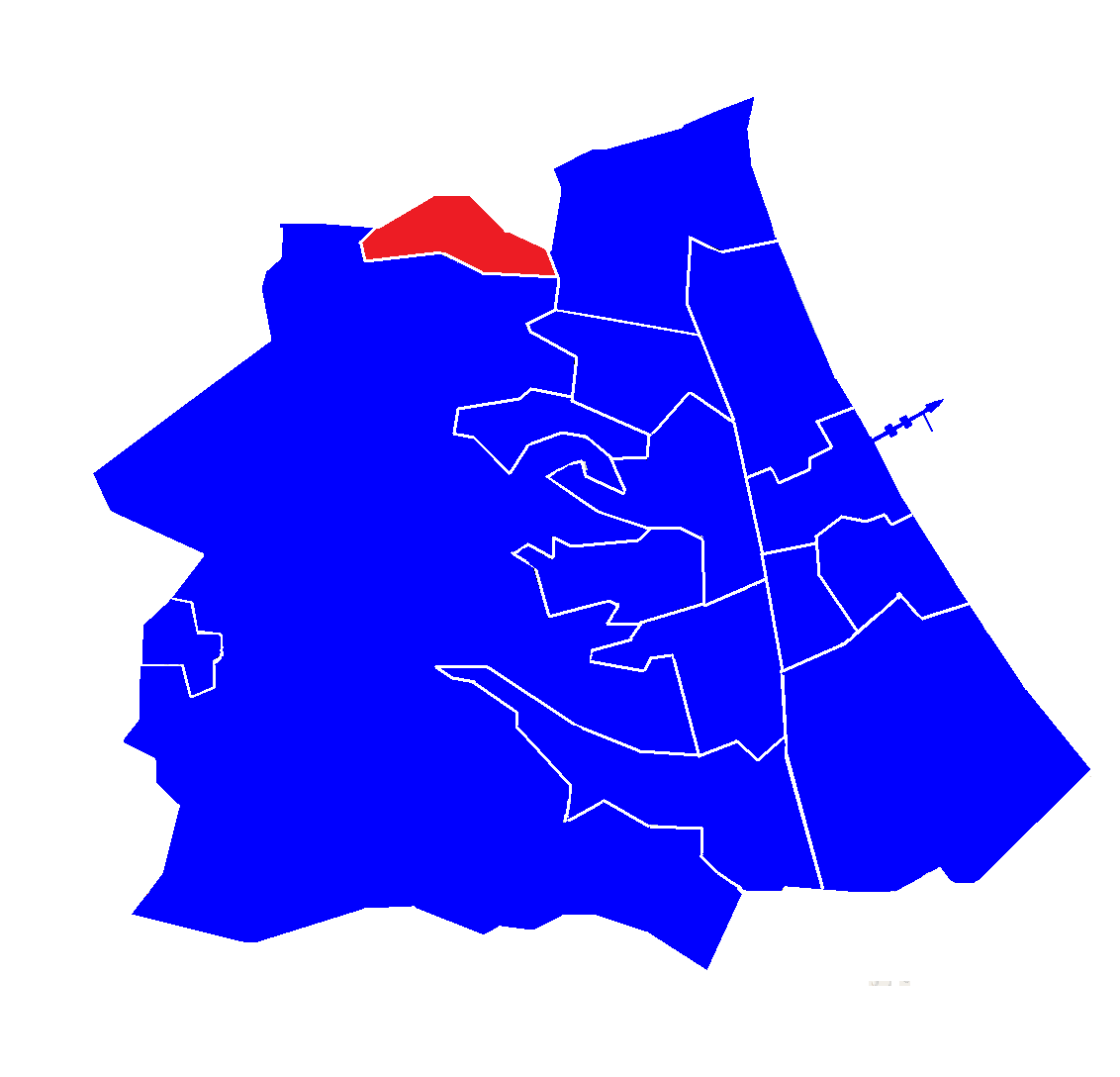 Brodwino